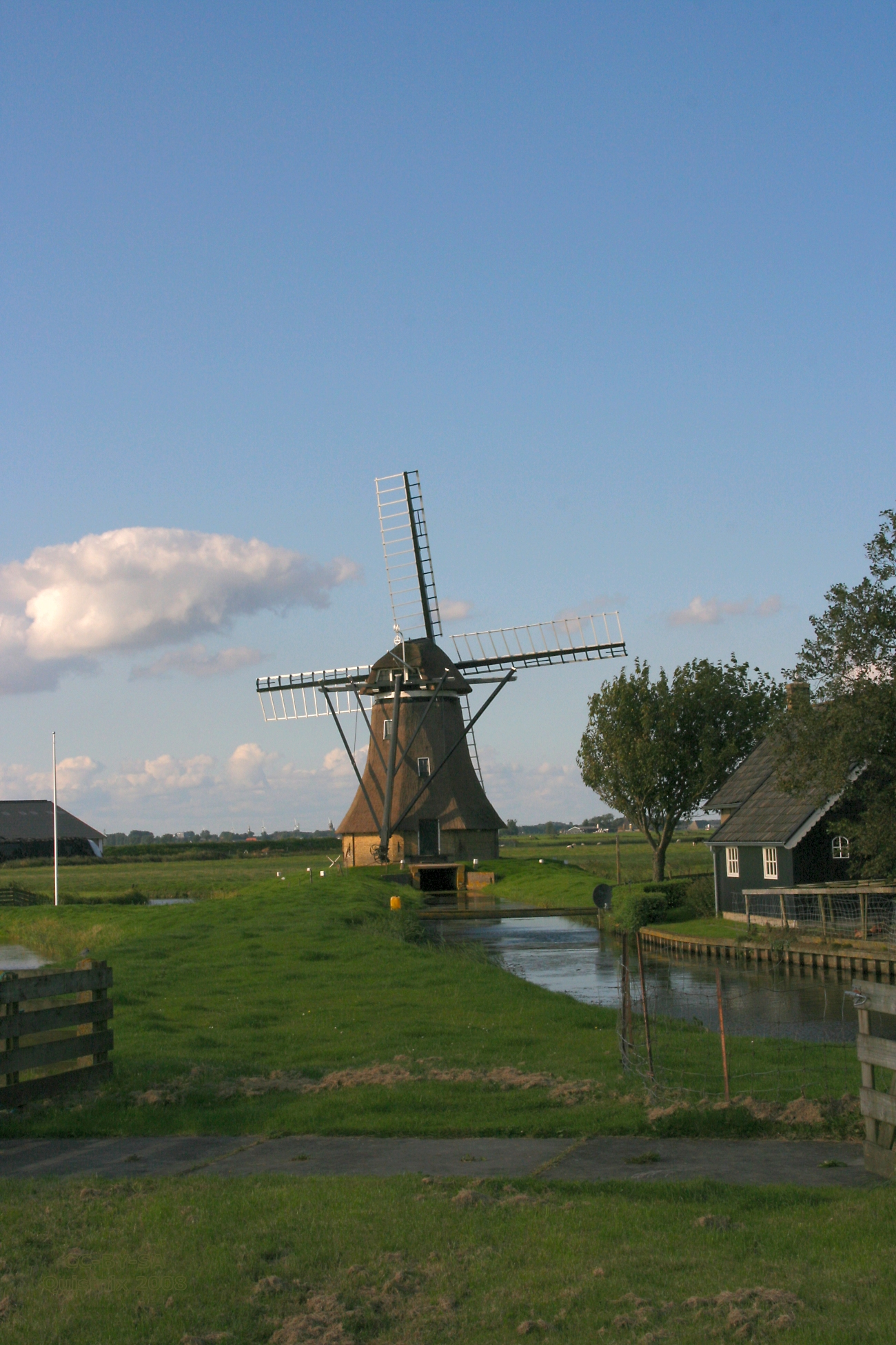 Huns: De Huinsermolen